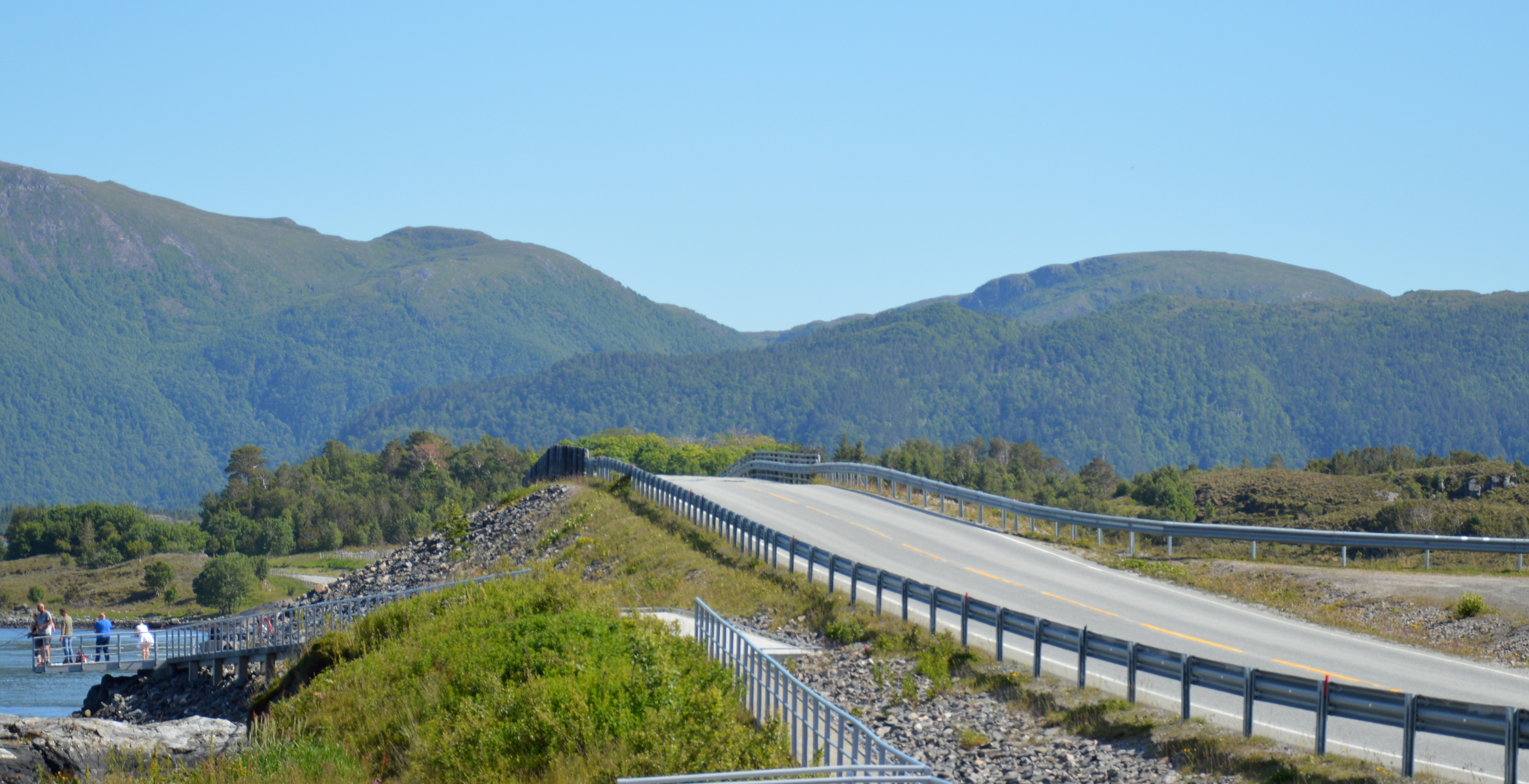 Geitøysund-Brücke Fahrbahn